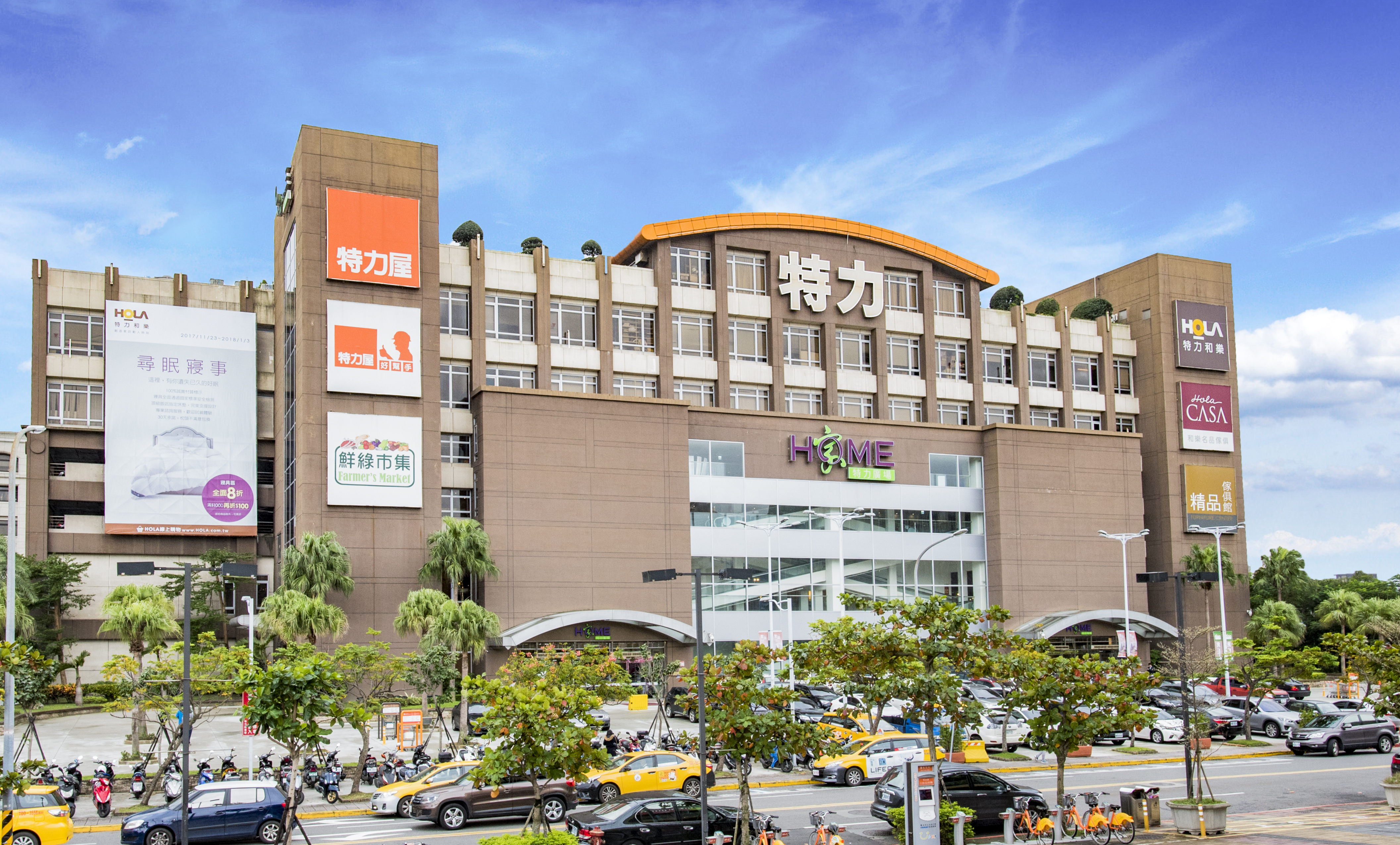 中文（台灣）: 特力集團總部